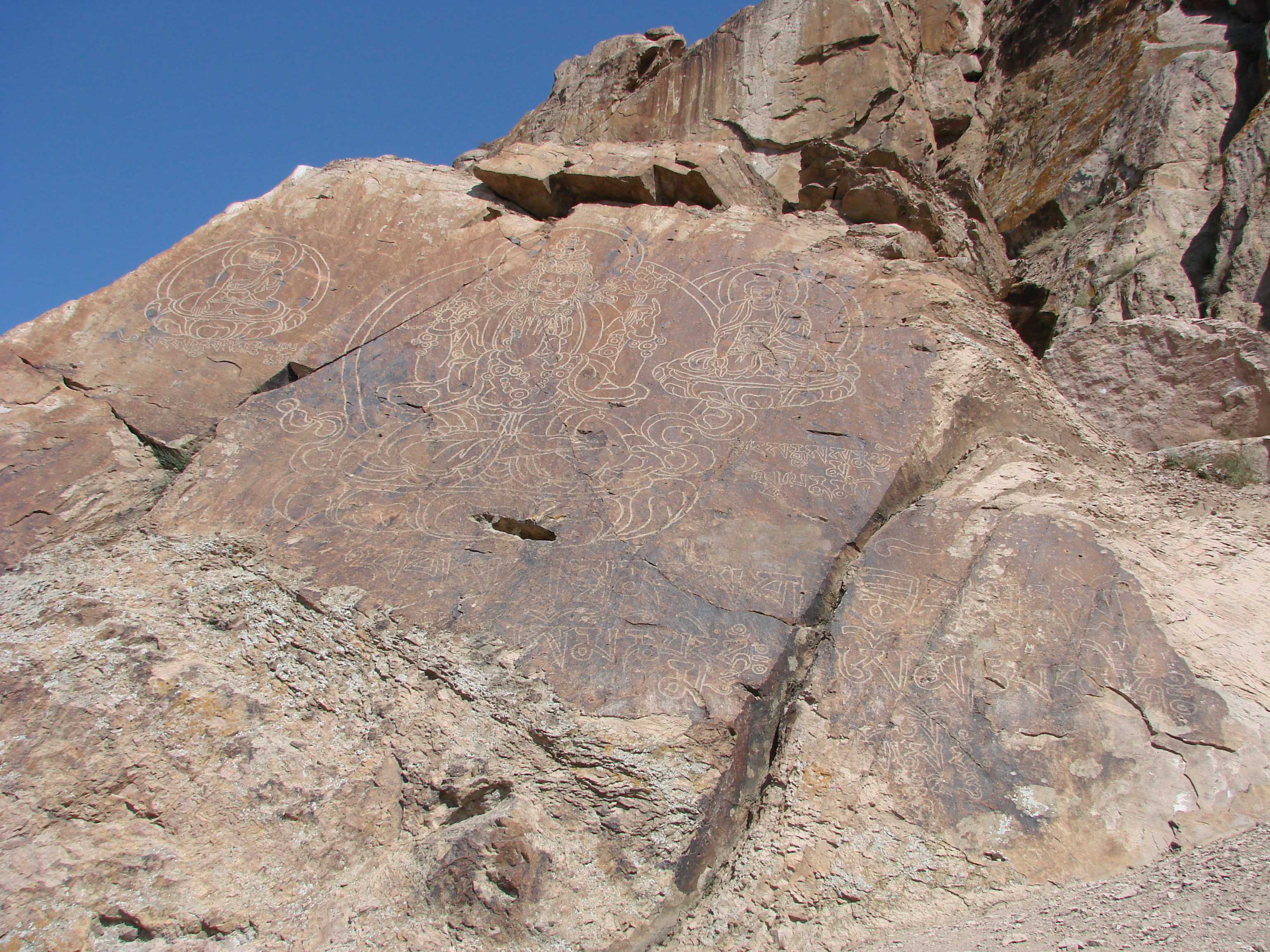 Наскальные изображения Будд, Казахстан, Алма-Атинская область